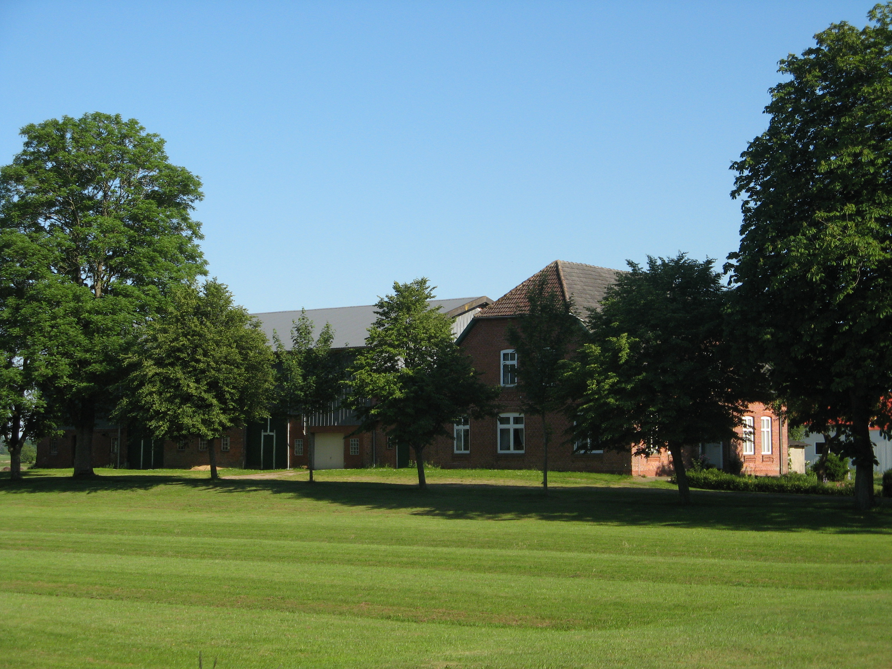 Farm in Schlichting